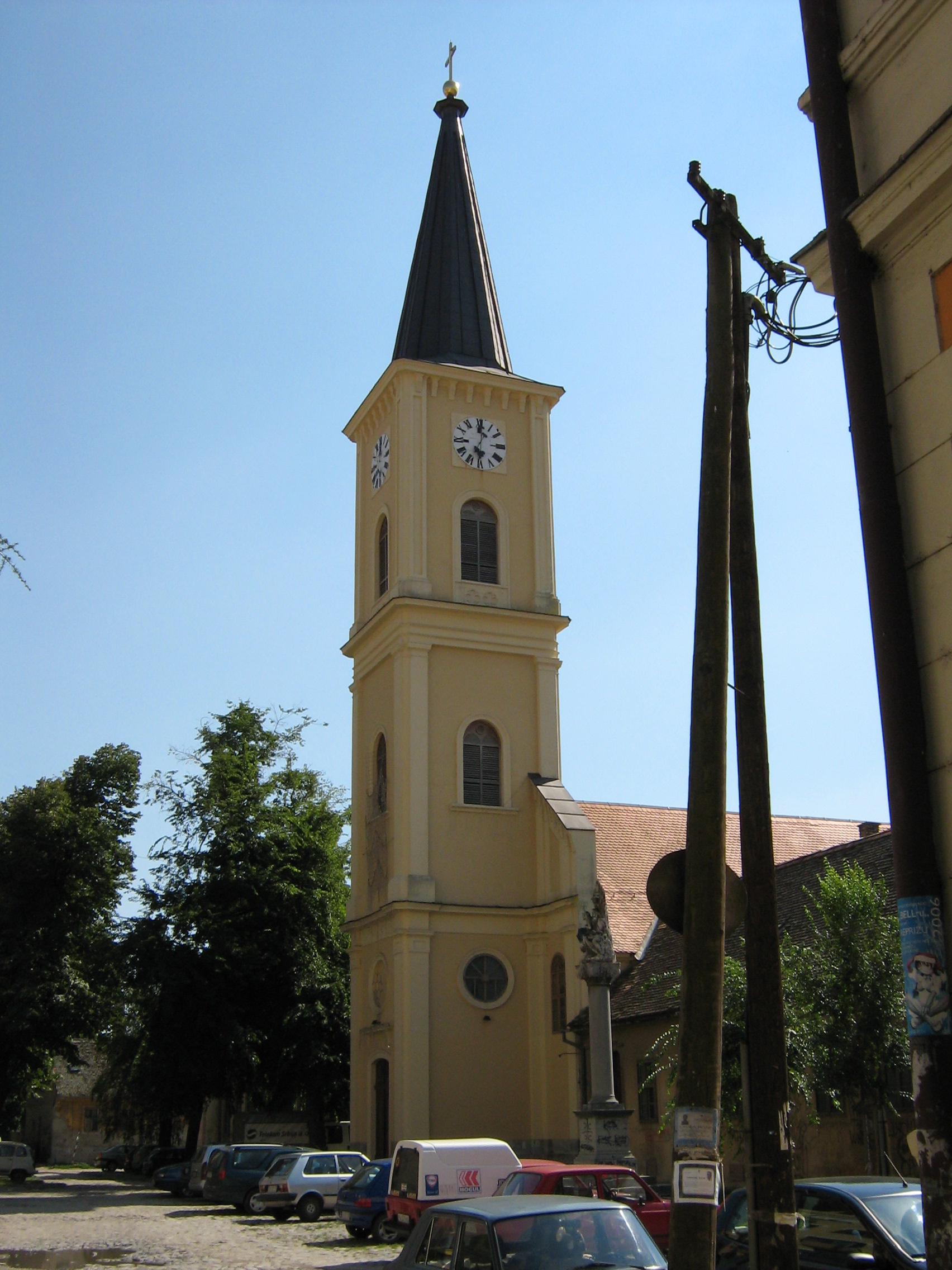 Roman catholic church in Pančevo/Rimokatolička crkva u Pančevu